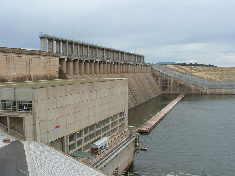 Le barrage Hume en Australie